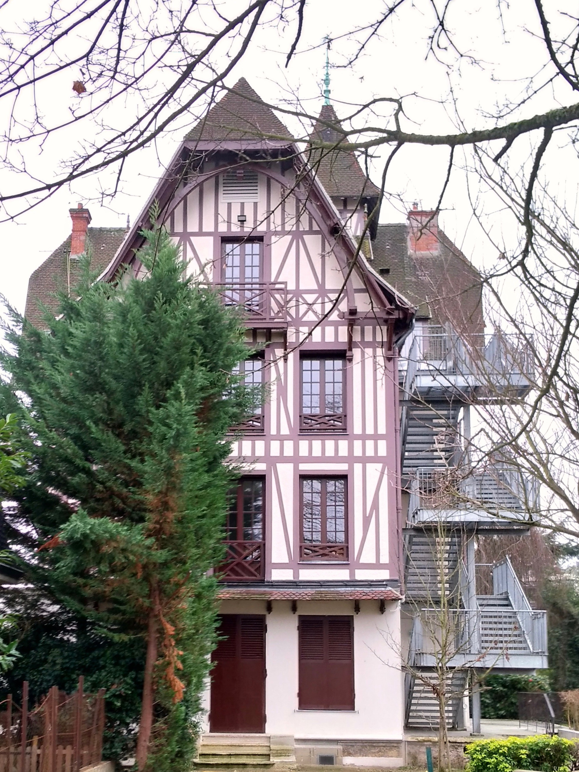 Bâtiment du lycée, situé au 4 rue de la Tour à Meudon Bellevue